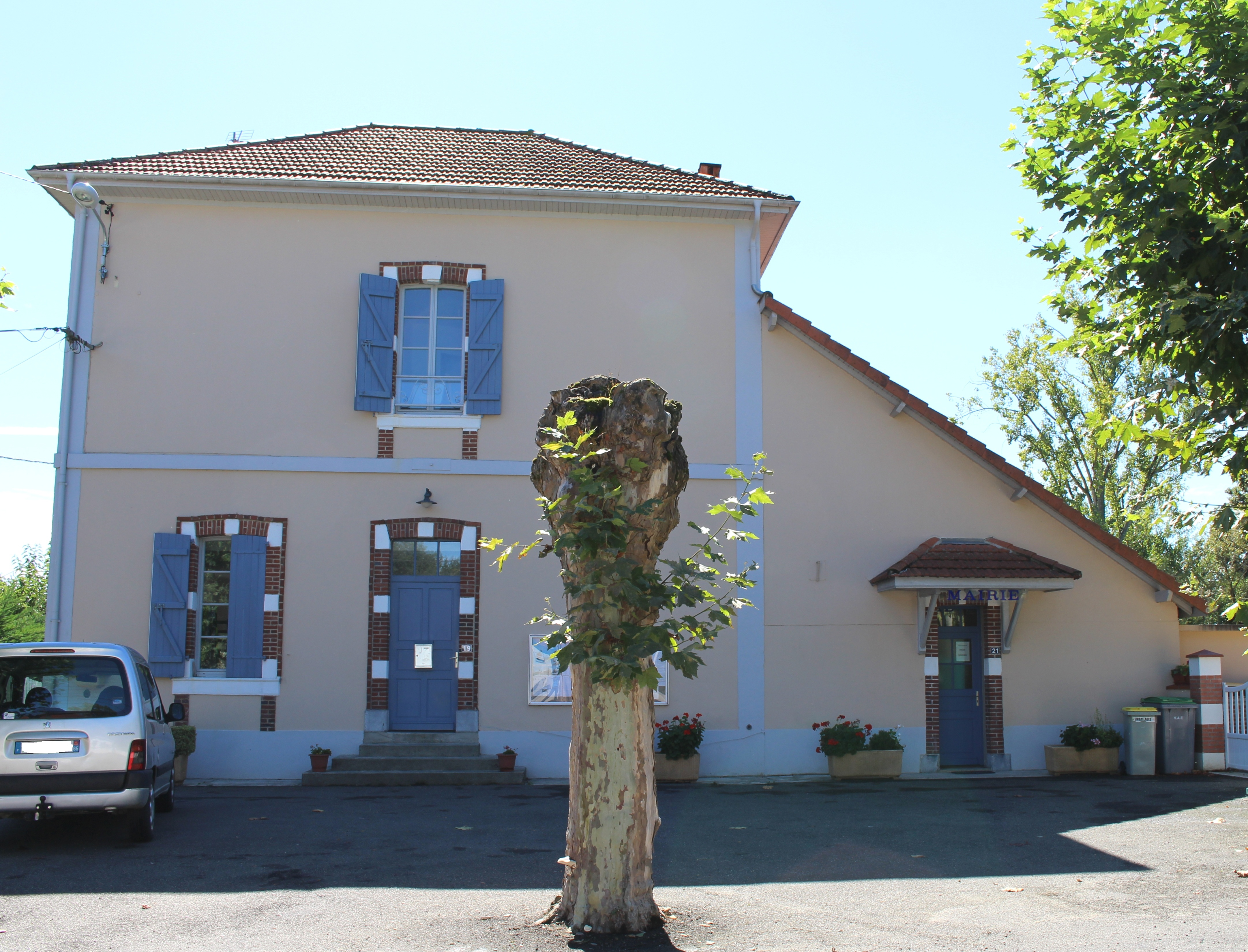 Mairie de Barbachen (Hautes-Pyrénées)